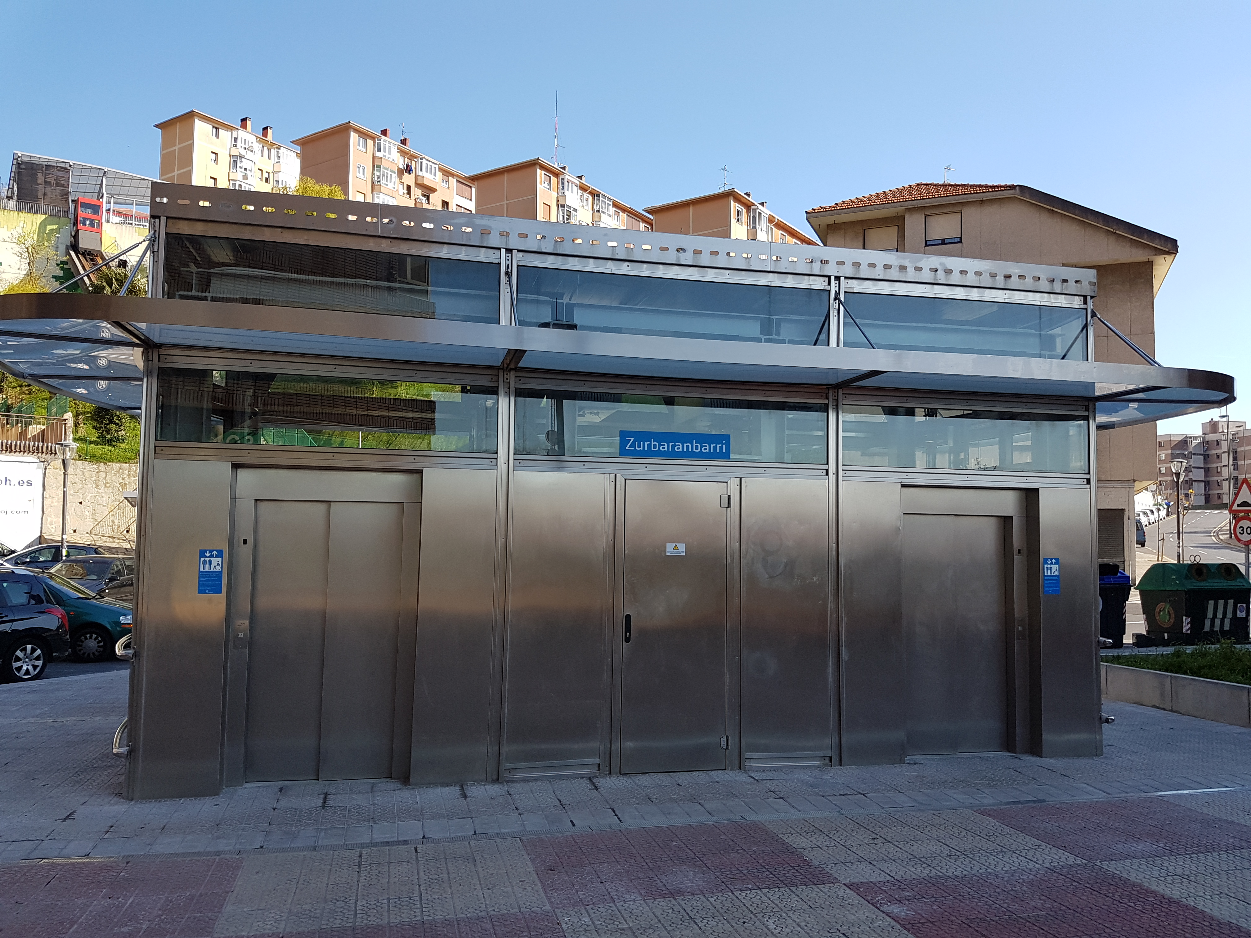 Ascensores de la estación de Zurbaranbarri.